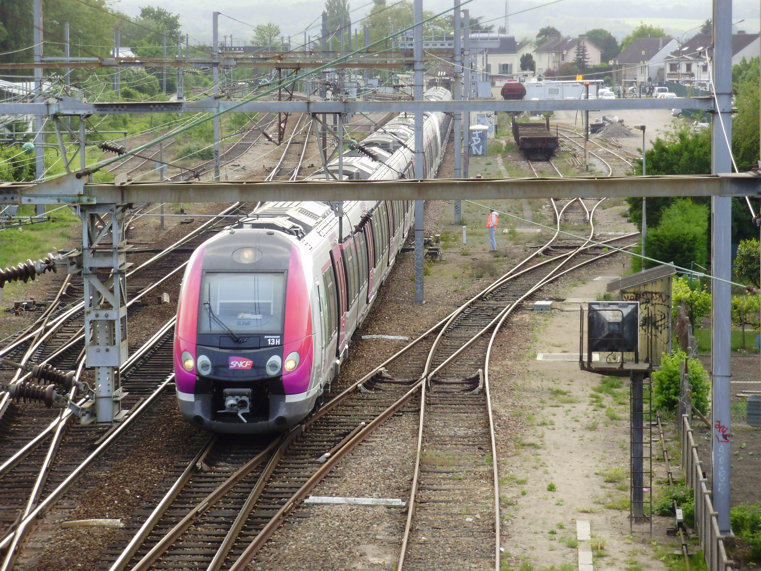 Gare de Montsoult - Maffliers, à Montsoult, Val-d'Oise, France : rame de type Z 50000 venant de Paris-Nord, quittant la gare